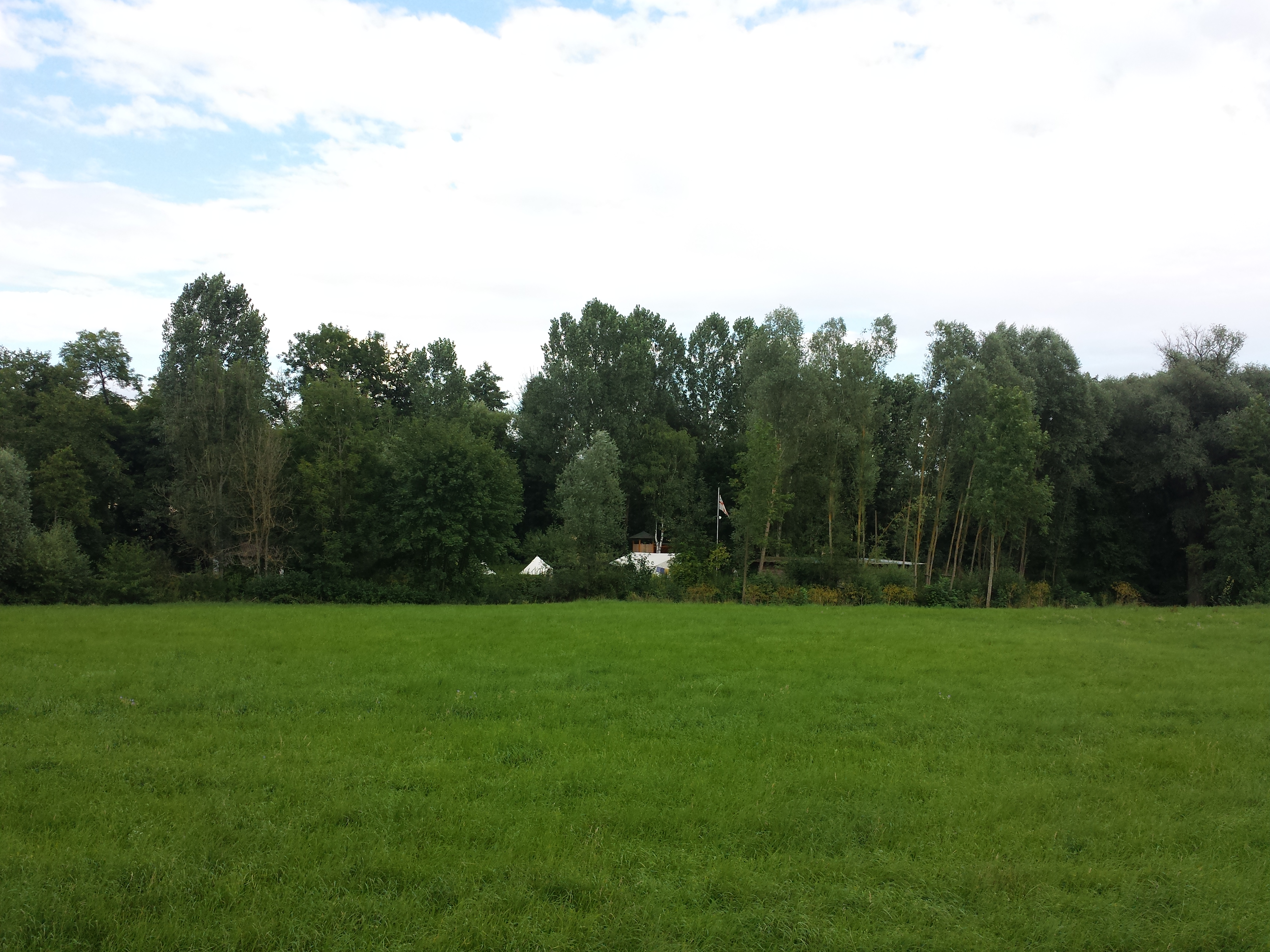 Ein Ferienzeltlager auf einer Tauberinsel bei Werbach. DLRG-Jugendzeltplatz Tauberinsel der DLRG-Ortsgruppe Werbach.